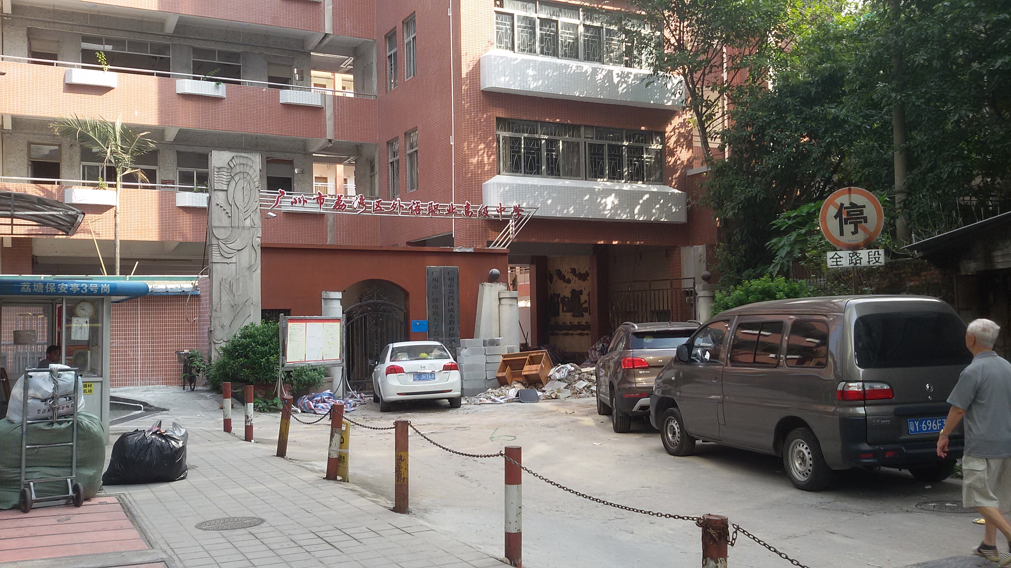 粵語: 荔灣區外語職業高級中學正門